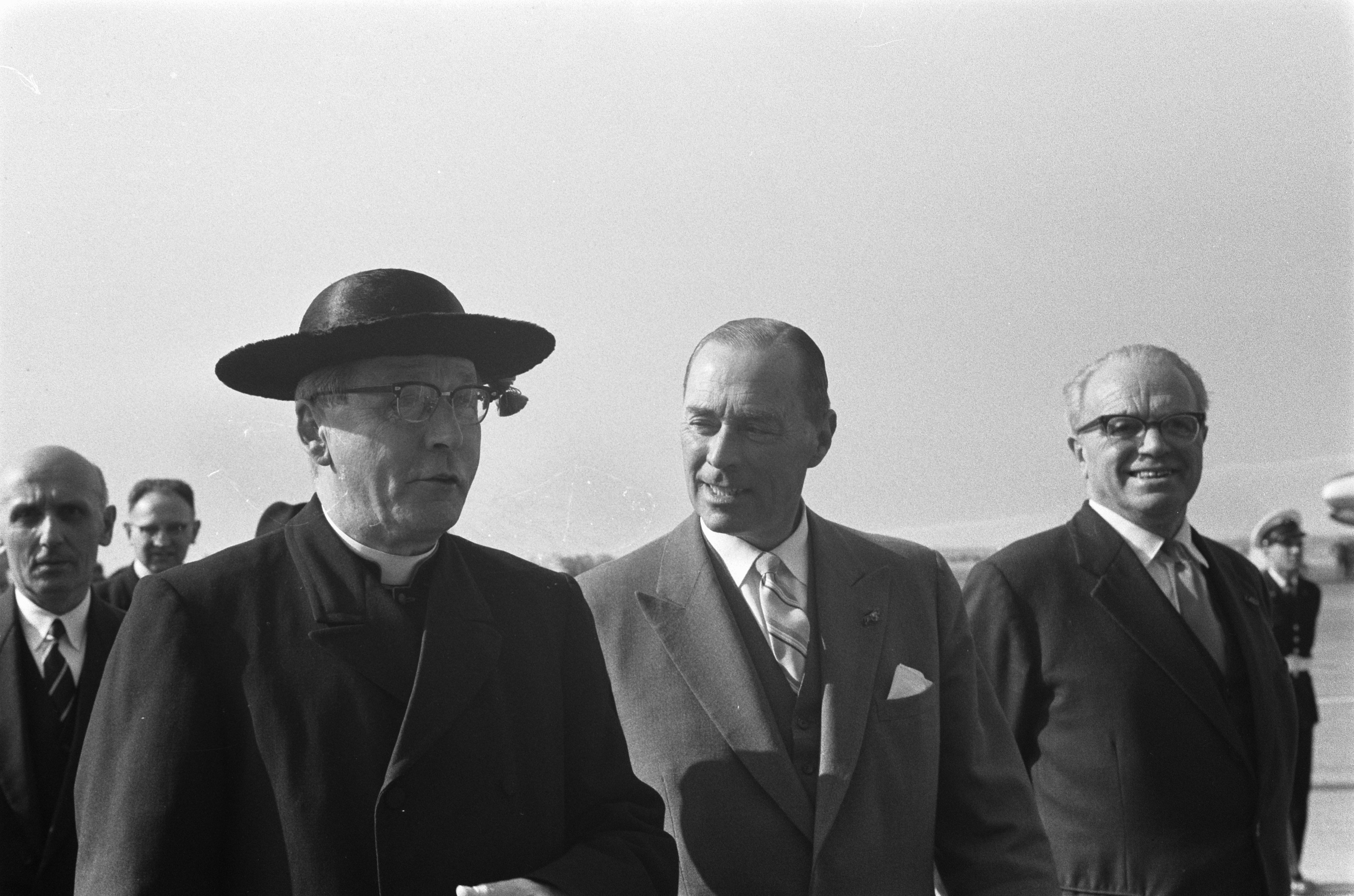 Collectie / Archief : Fotocollectie Anefo Reportage / Serie : [ onbekend ] Beschrijving : Aankomst kardinaal Alfrink uit Rome Datum : 7 april 1960 Locatie : Italië, Rome Trefwoorden : AANKOMSTEN Persoonsnaam : Alfrink, Bernardus Fotograaf : Pot, Harry / Anefo Auteursrechthebbende : Nationaal Archief Materiaalsoort : Negatief (zwart/wit) Nummer archiefinventaris : bekijk toegang 2.24.01.05 Bestanddeelnummer : 911-1552